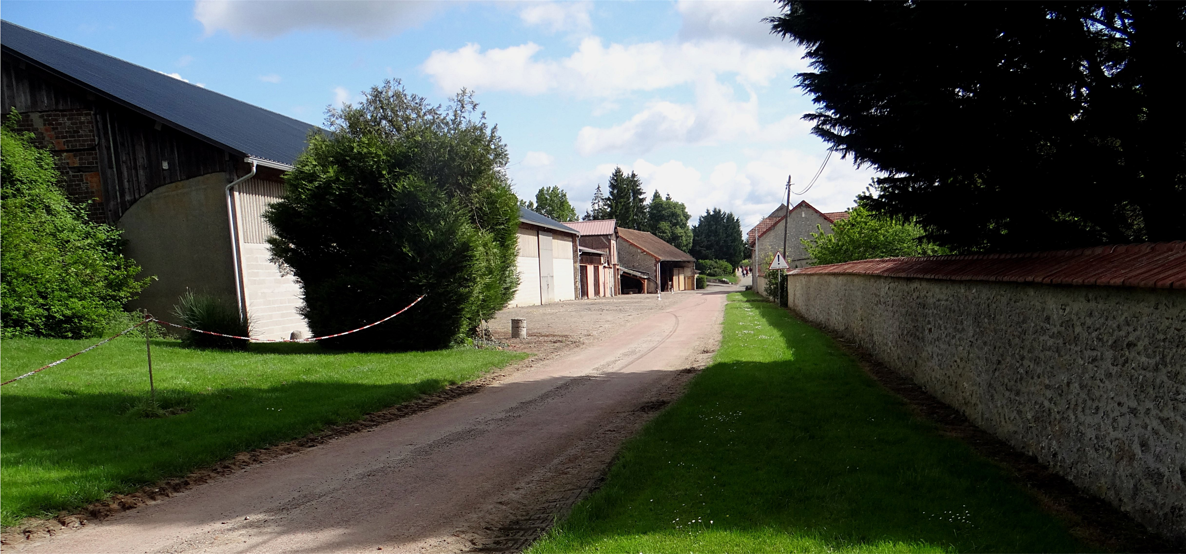 Le lieux-dit St Aubin, commune de Neauphle-le-Vieux, Yvelines, France.